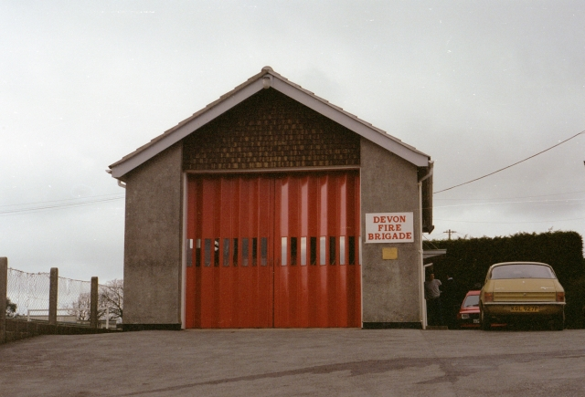 Bere Alston Fire Station